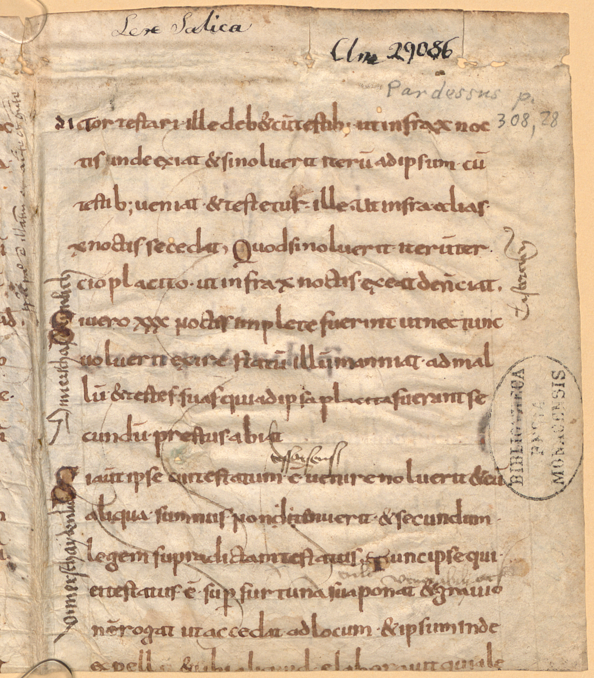 Lex Salica